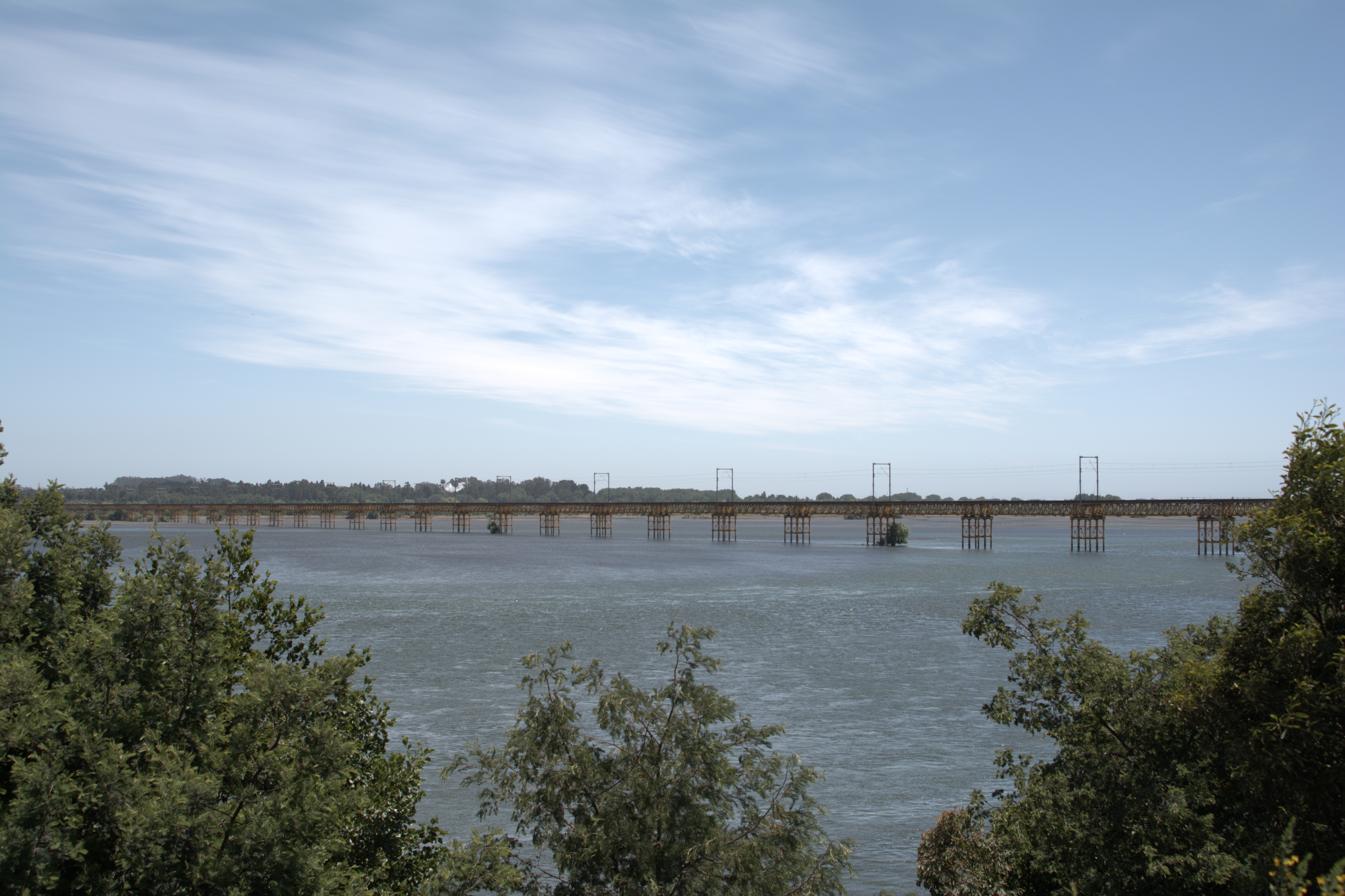 Puente ferroviario Biobío en Concepción. Concepción, diciembre de 2019